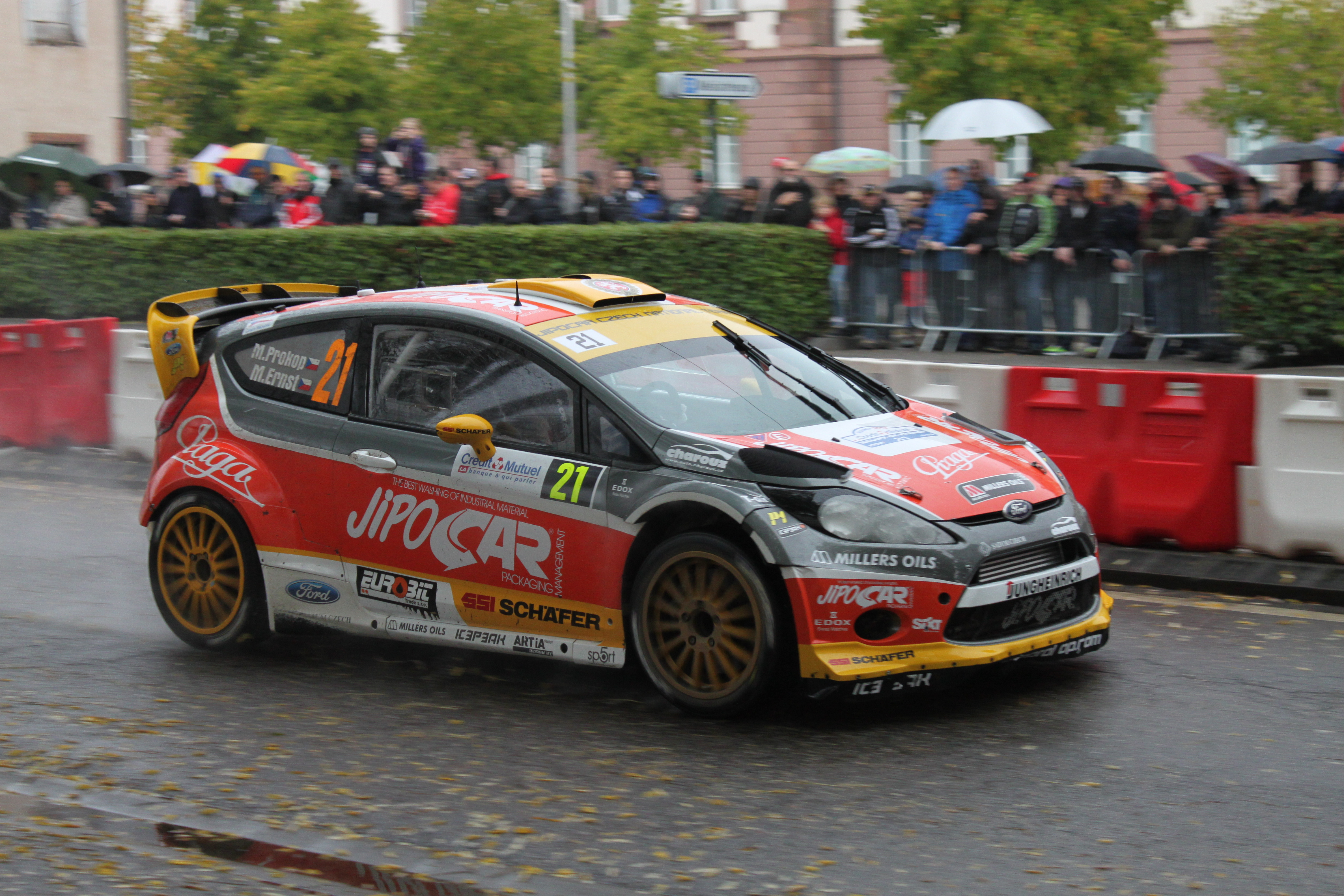 Martin Prokop au Rallye de France-Alsace 2013 a Hageunau